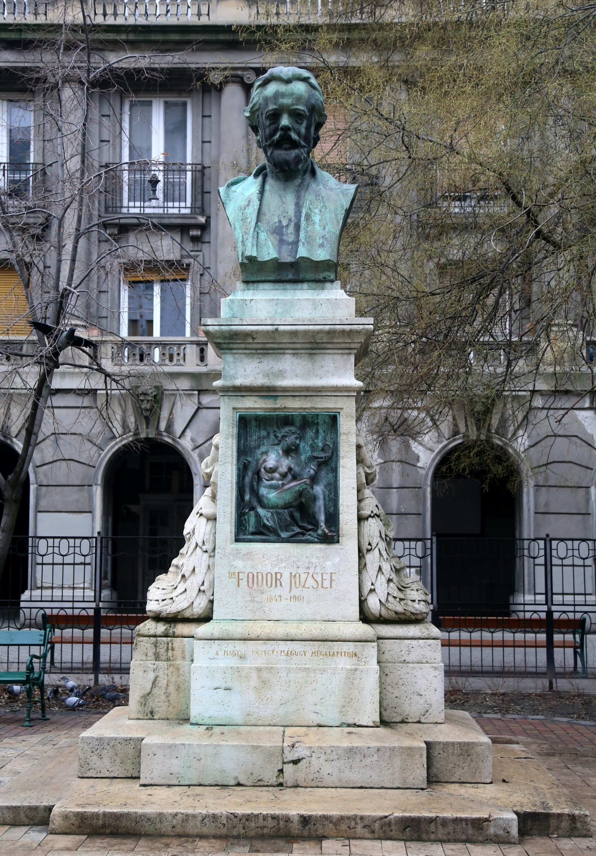 Fordor József szobra Budapesten, a Guttenberg téren. A 4,8 m-es szobrot ifj. Vastagh György 1909-ben bronzból és mészkőből készítette.